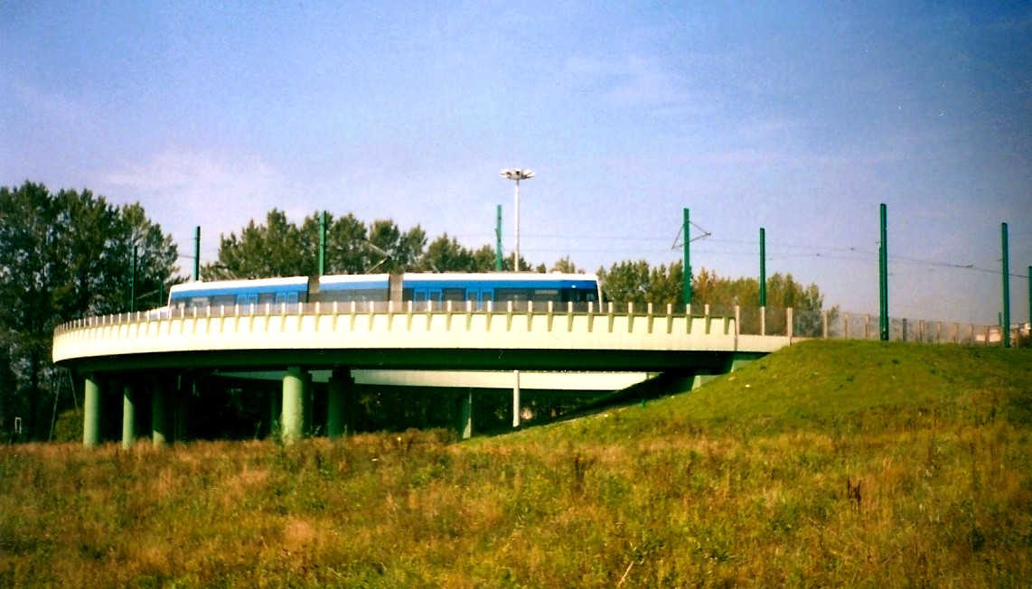 Krakowski Szybki Tramwaj . Pętla estakadowa zlokalizowana na osiedlu Kurdwanów . Na obiekcie znajduje sie wagon typu NGT-6 .